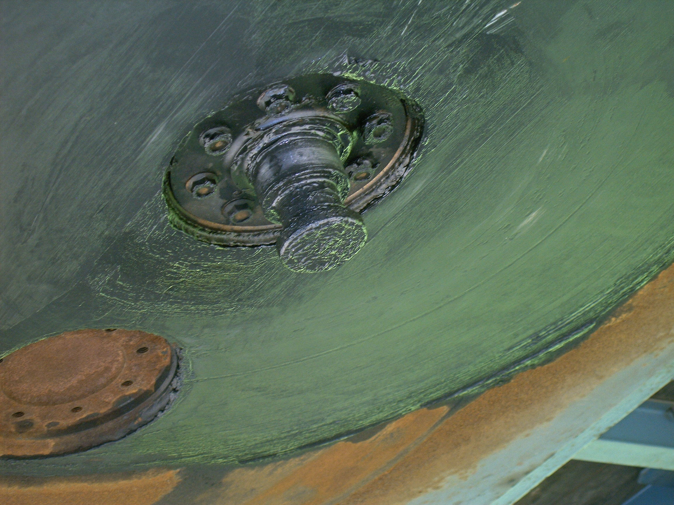 Kingpin under a trailer